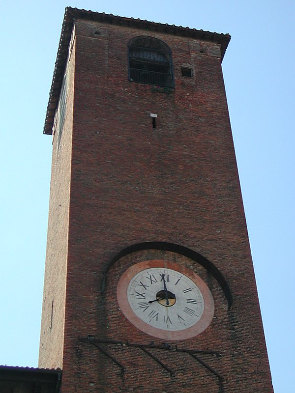 Torre del Palazzo del Podestà a Mantova. Source: photo uploaded by User:RicciSpeziari. Photographer: Riccardo Speziari.